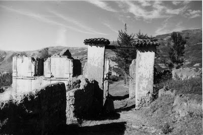 Así perdió Angasmarca uno de sus más importantes atractivos culturales. 2002.